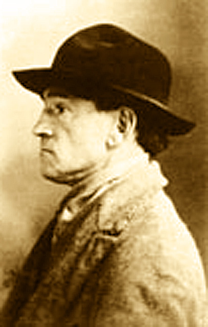 Louis-Mathieu Verdilhan, paysagiste (1875-1928)